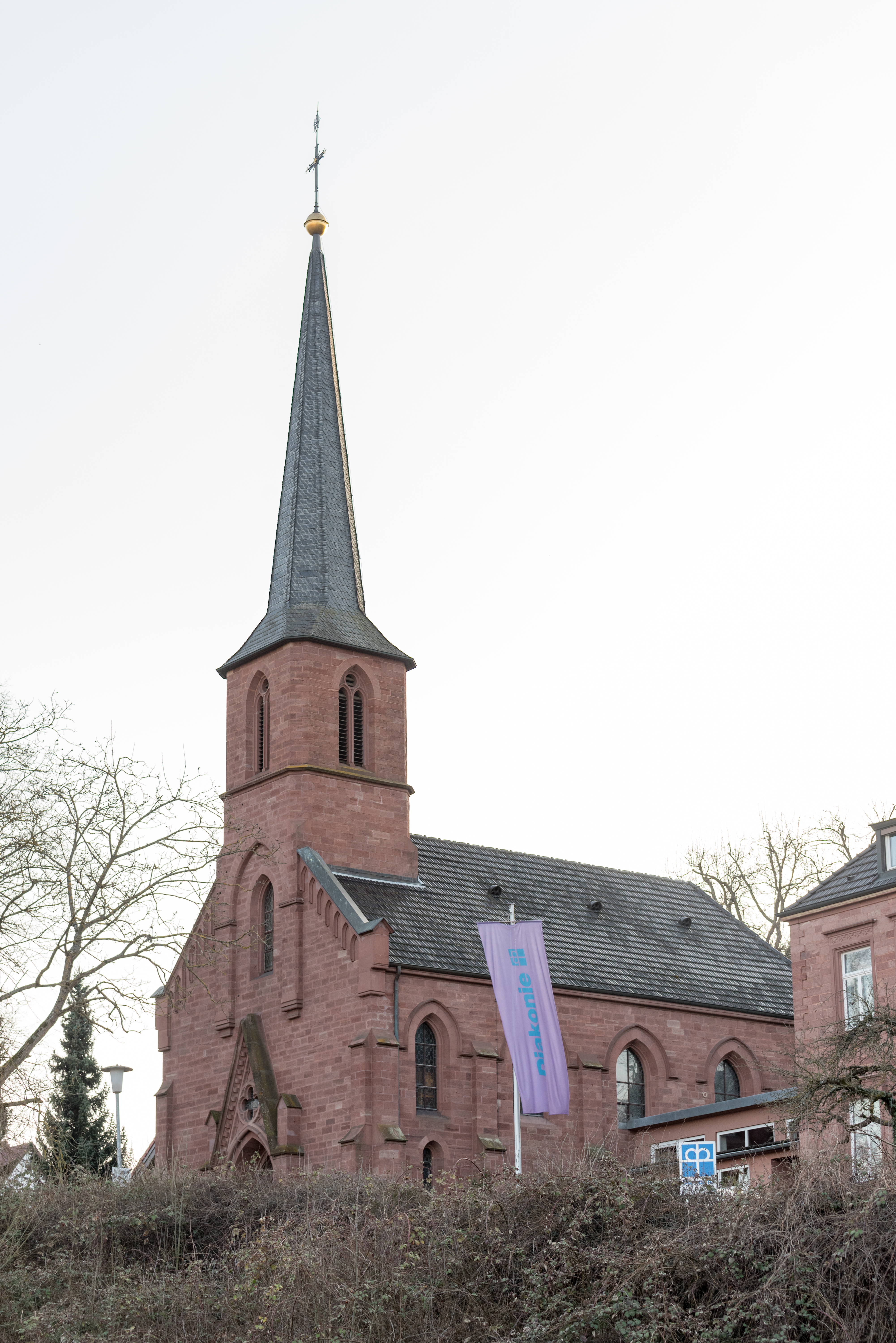 Tauberbischofsheim, Kirchweg 6